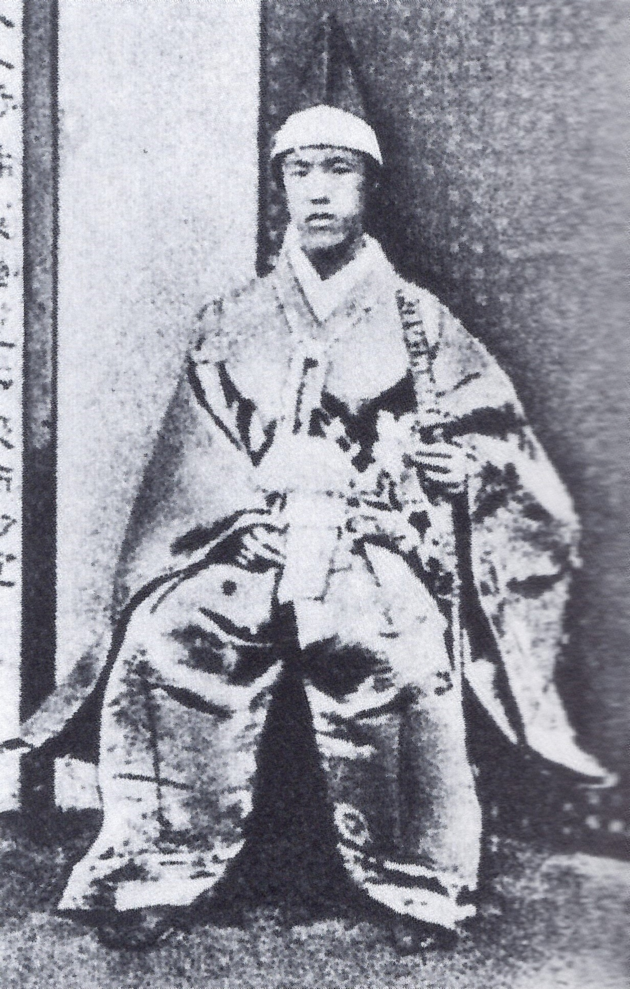 六郷政鑑の肖像写真。